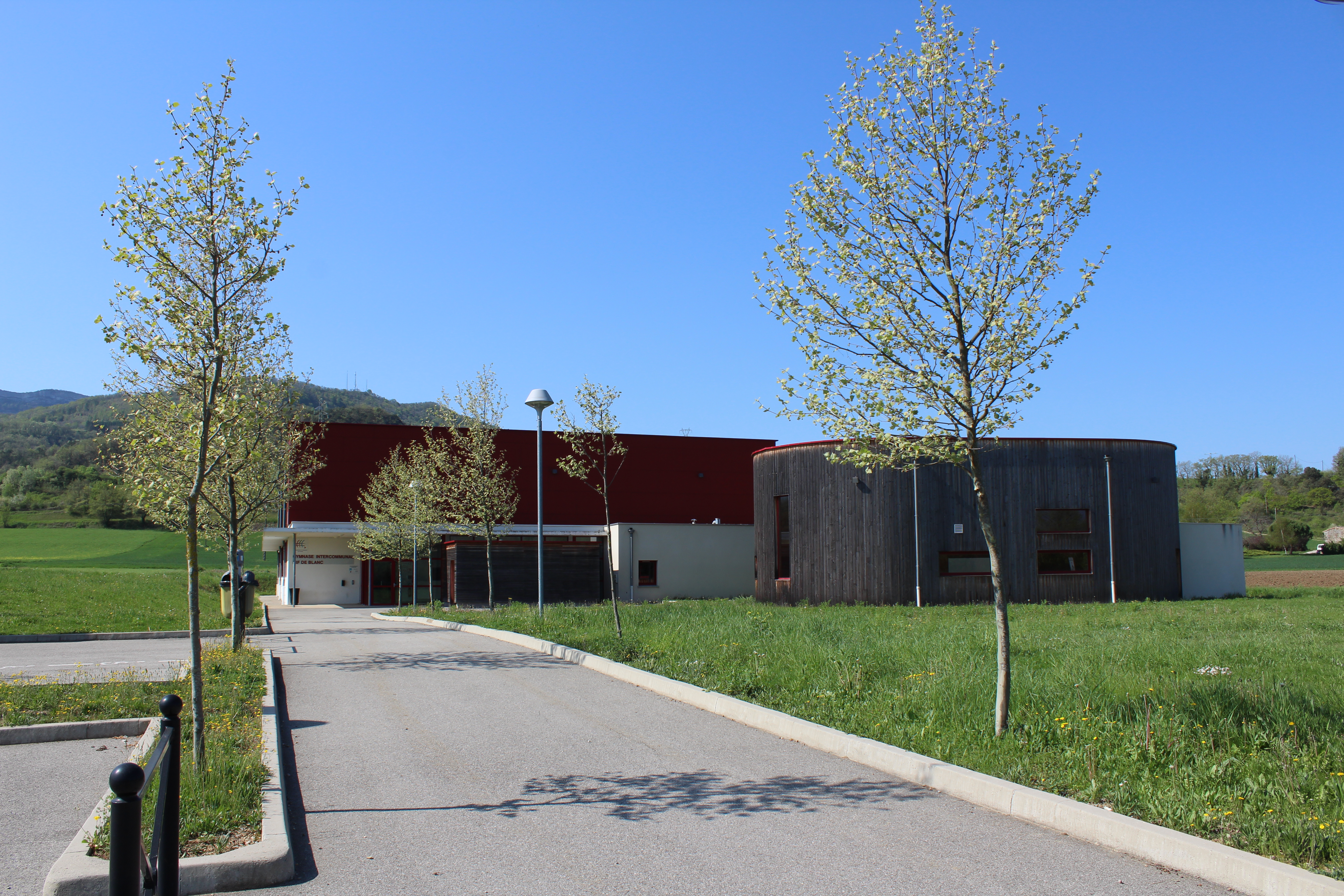 Photographie du gymnase Rif de Blanc